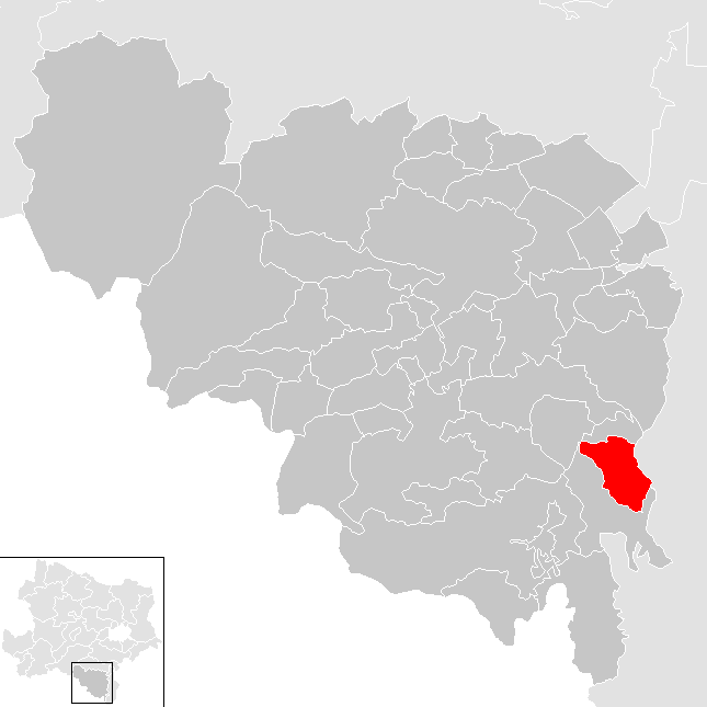 Bezirk Neunkirchen